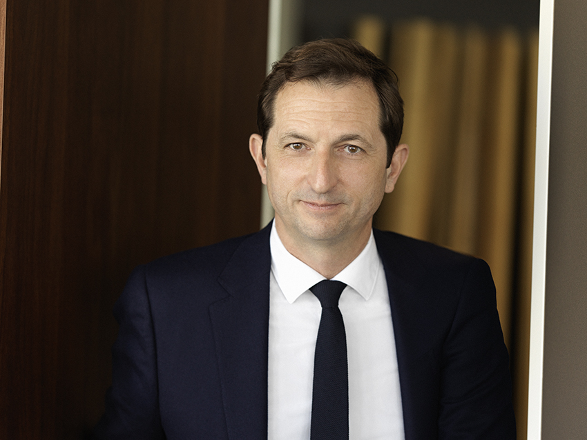 Bertrand Camus, directeur général de Suez depuis le 14 Mai 2019. Photo prise par denis Felix